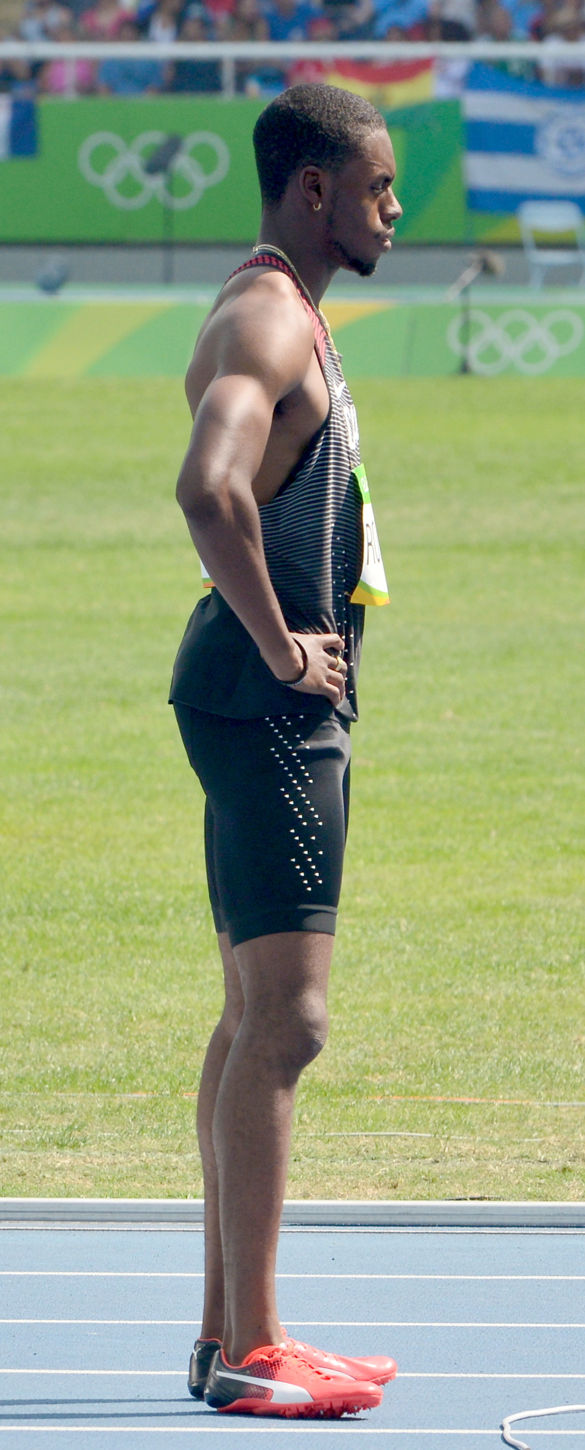 Séries du 200m Homme aux JO de Rio 2016